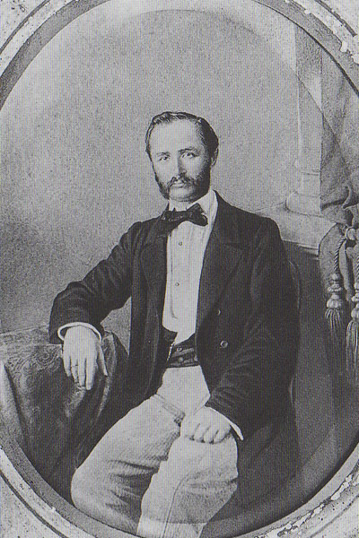 Стојан Вељковић, правник и политичар (1830-1925)